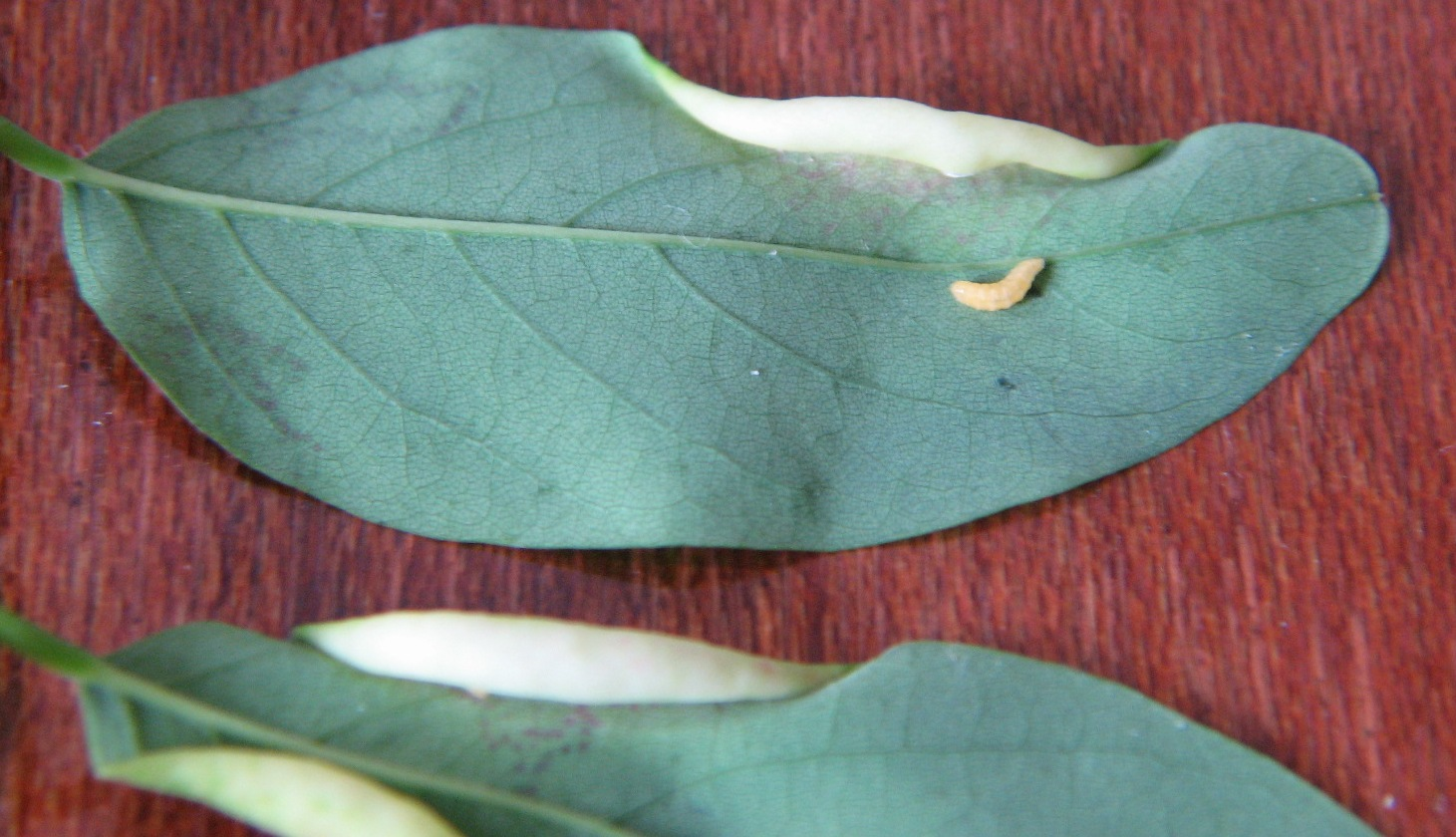 galmug op Robiniablad (Obolodiplosis robiniae)